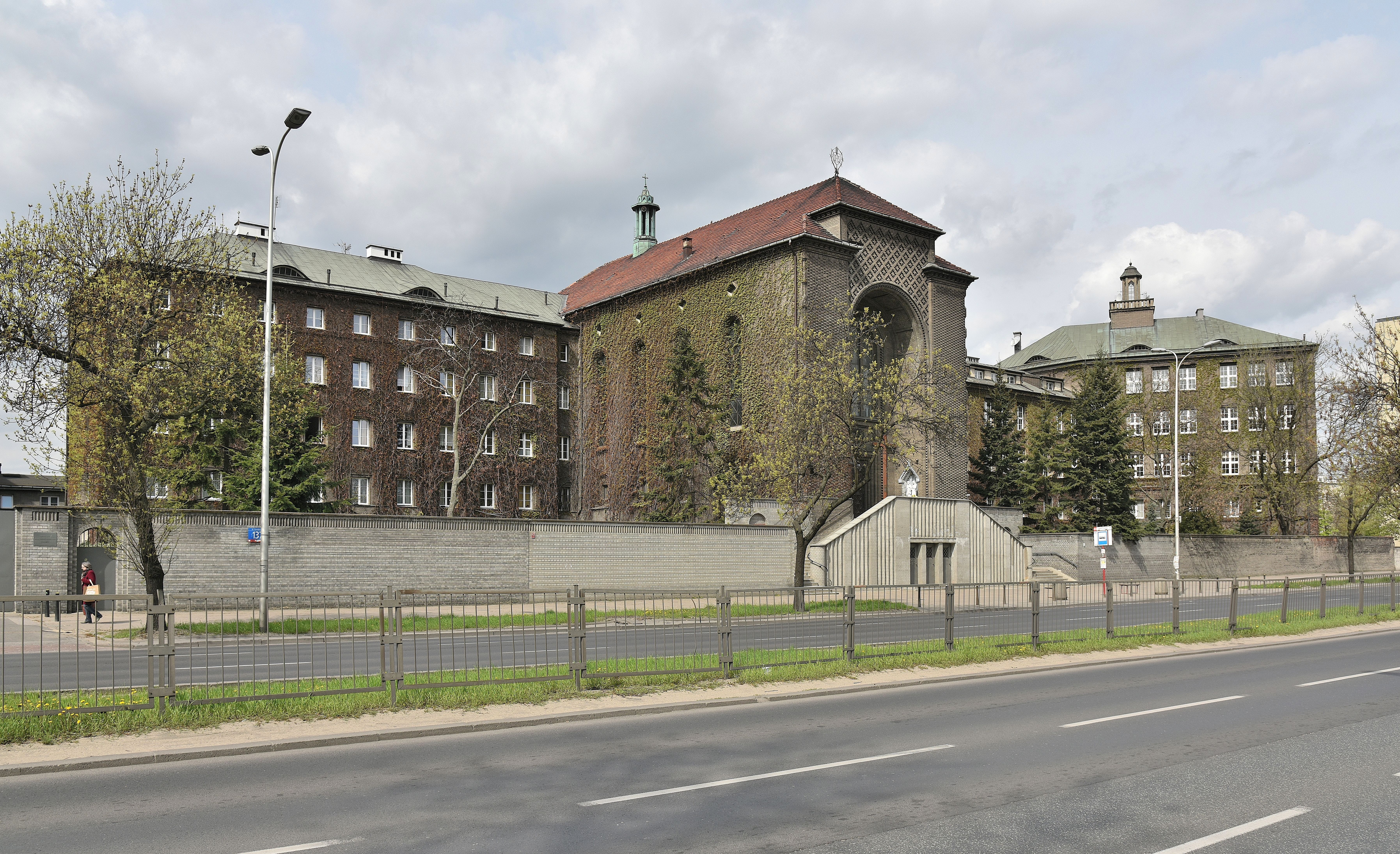 Zgromadzenie Sióstr Najświętszej Rodziny z Nazaretu przy ul. Czerniakowskiej 137 w Warszawie